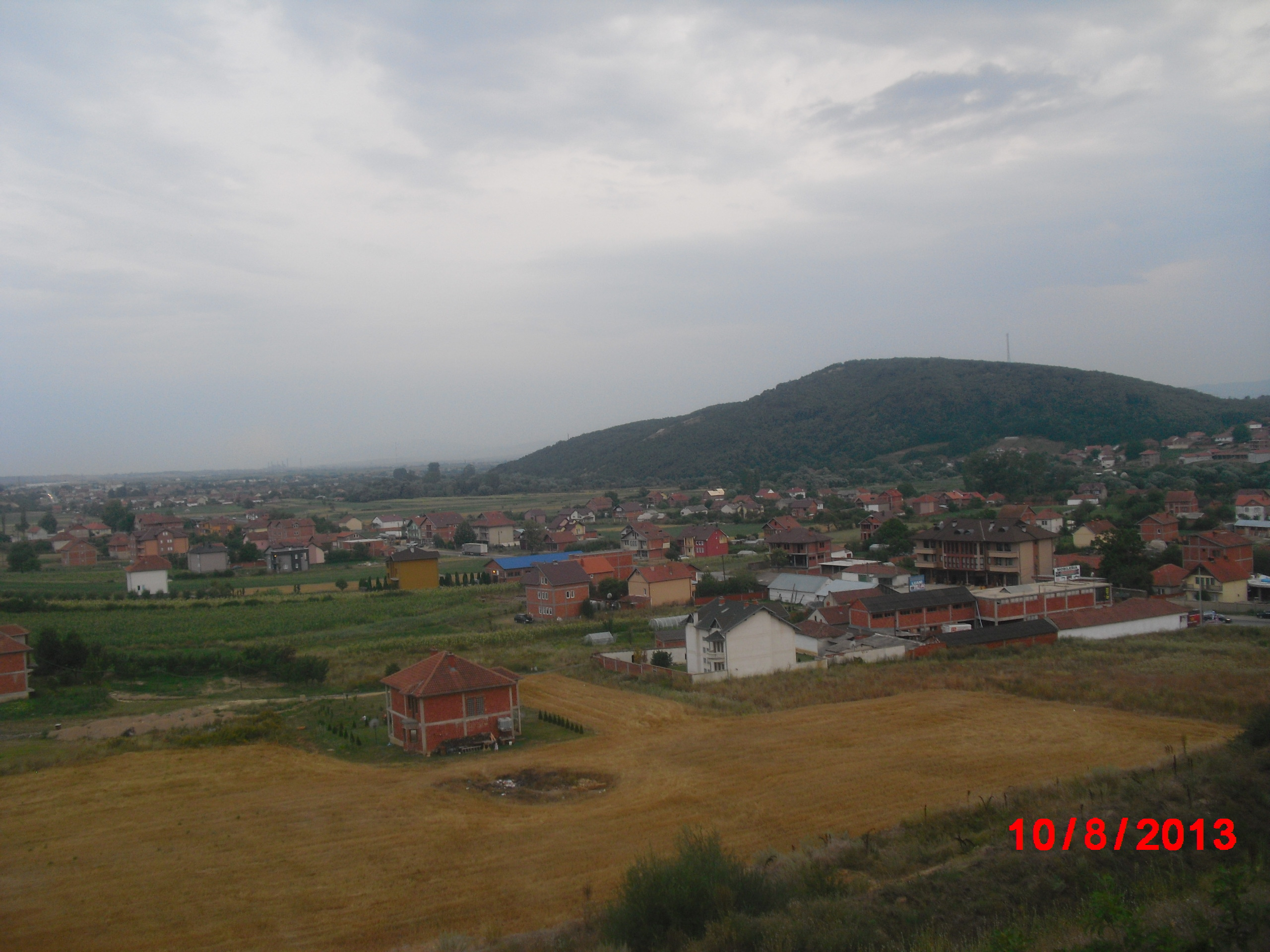 Fshati Vranidoll